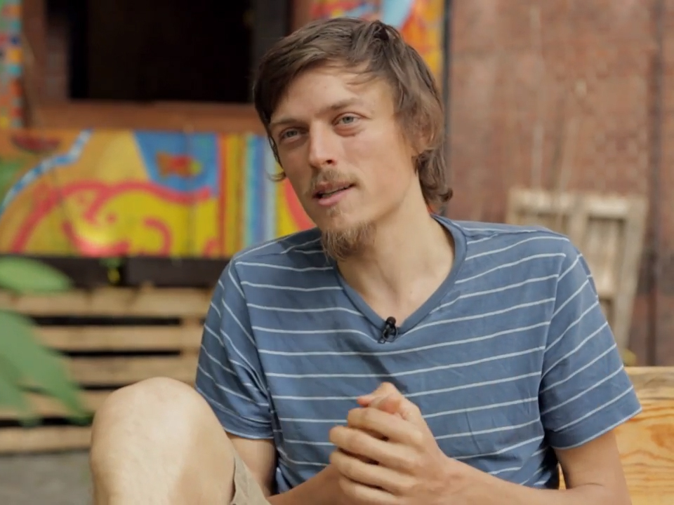 Raphael Fellmer ist Umweltaktivist und Lebensmittelretter. Seit 2008 twittert er als @raphaelfellmer, um das Bewusstsein für Konsum, Klimawandel und Ernährung zu schärfen. Raphael geht als gutes Beispiel voran. Fünf Jahre lang lebte Raphael ohne Geld. Der 32-Jährige lässt uns über das eigene Konsumverhalten nachdenken ohne dabei den Zeigefinger zu heben. Besonders engagiert er sich für die Initiative "foodsharing", die sich gegen Lebensmittelverschwendung einsetzt. Für einen bewussten Konsum von Lebensmitteln oder die Geschichte hinter dem Tweet: "Lasst die Lebensmittel länger leben" Die Tweets von Raphael gibt´s unter: Mehr Folgen gibt's unter oder hier im Channel.